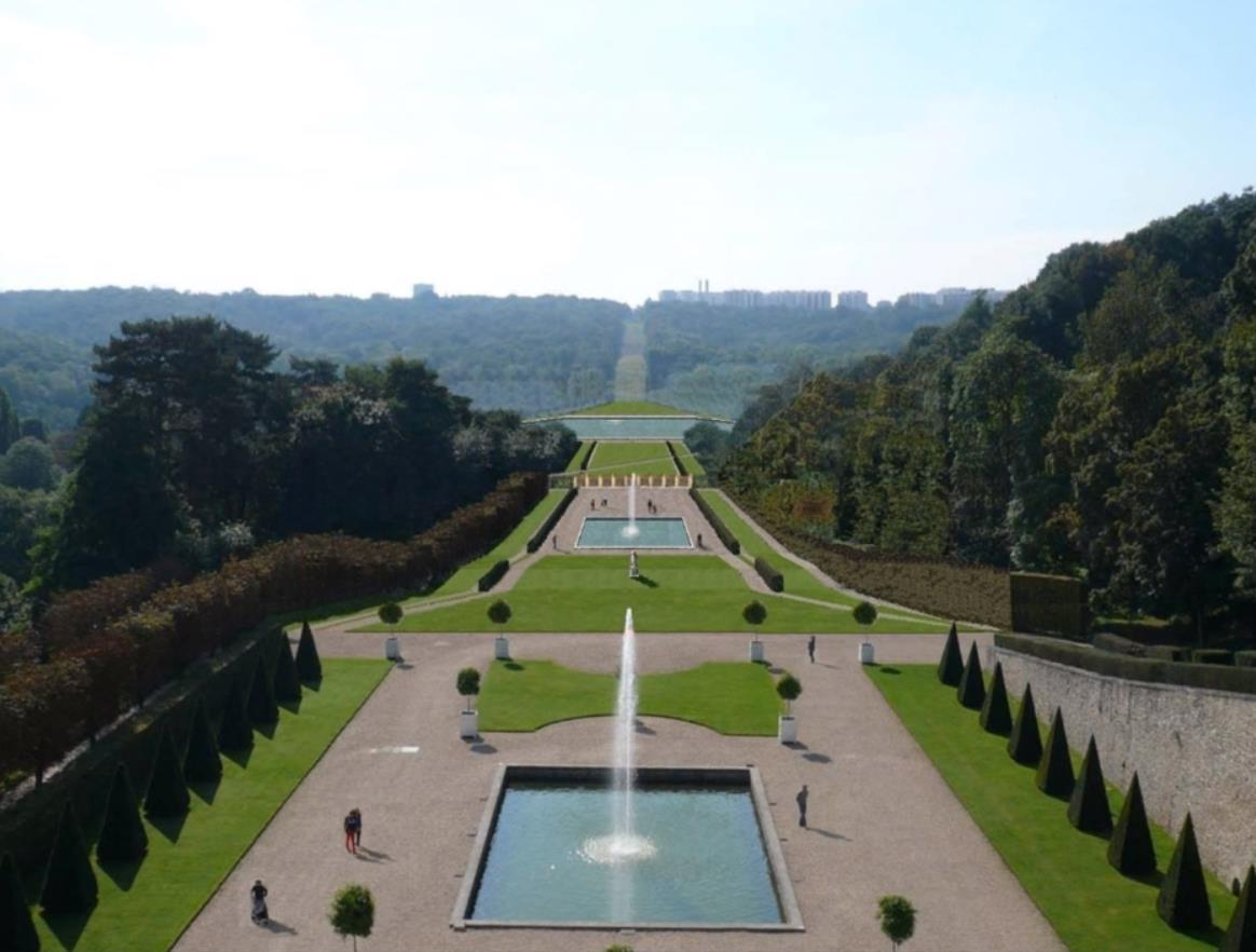 Restitution de la Grande Perspective de Meudon (photo-montage). par Gilles Fiant, 2017.